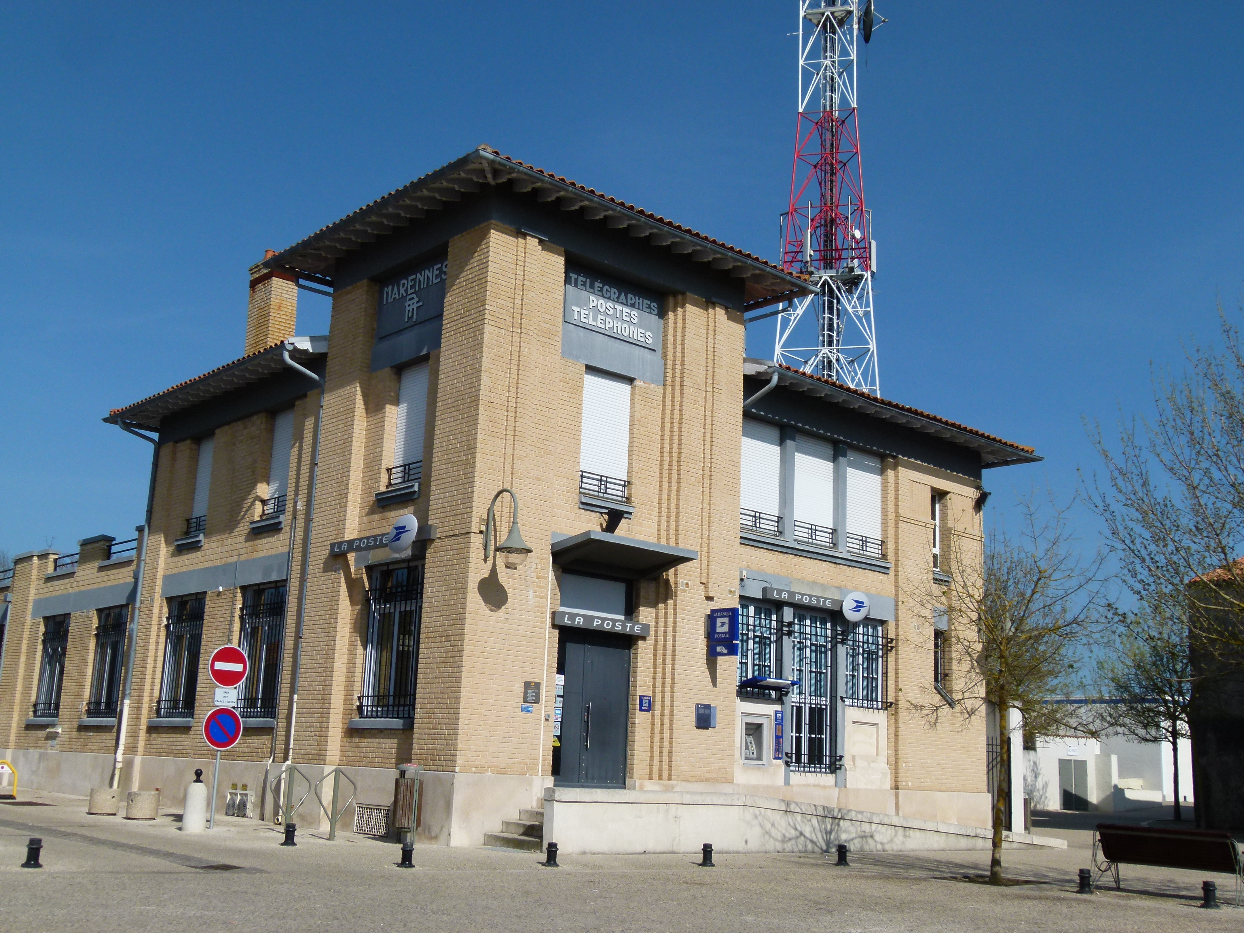 La Poste à Marennes (17)